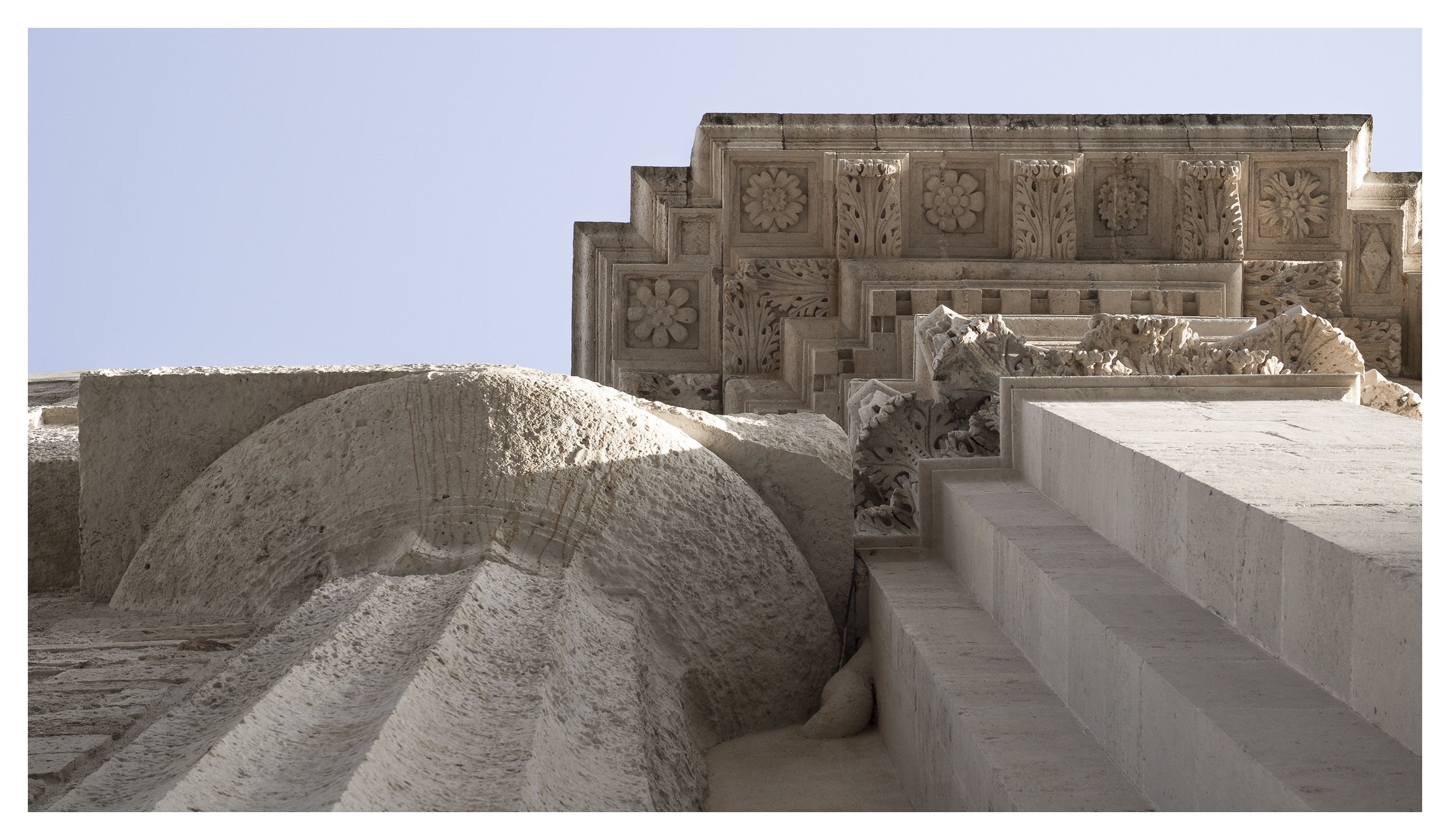 dettaglio del prospetto laterale